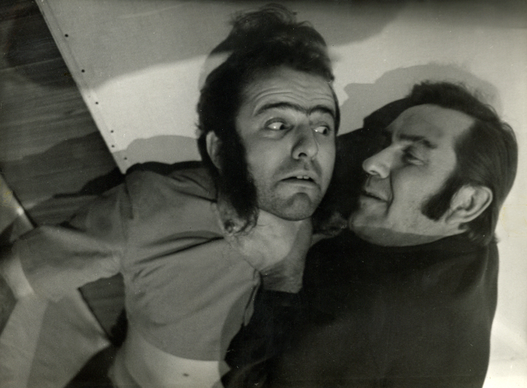 Fernando Arrabal, Arhitekt in asirski cesar, Drama SNG v Ljubljani. Na fotografiji: Janez Hočevar (Arhitekt), Jurij Souček (Cesar).